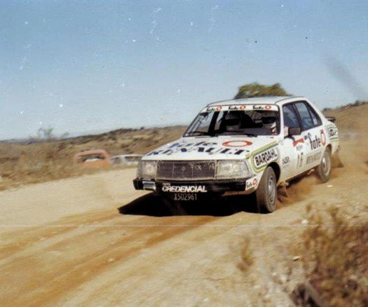 Ernesto Mario Soto en el Rally Argentina 1985, sobre un Renault 18.